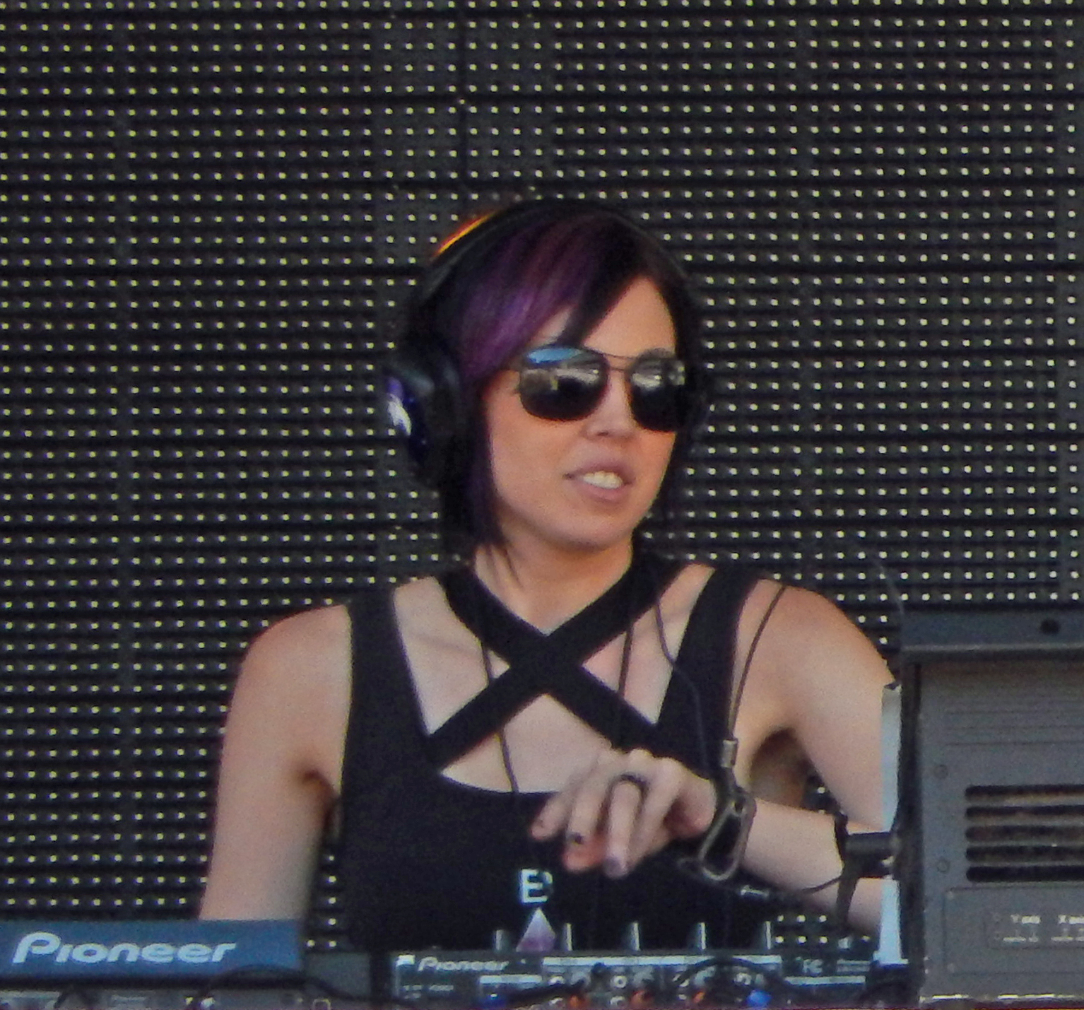 Dani Deahl @ Spring Awakening 6/13/2014